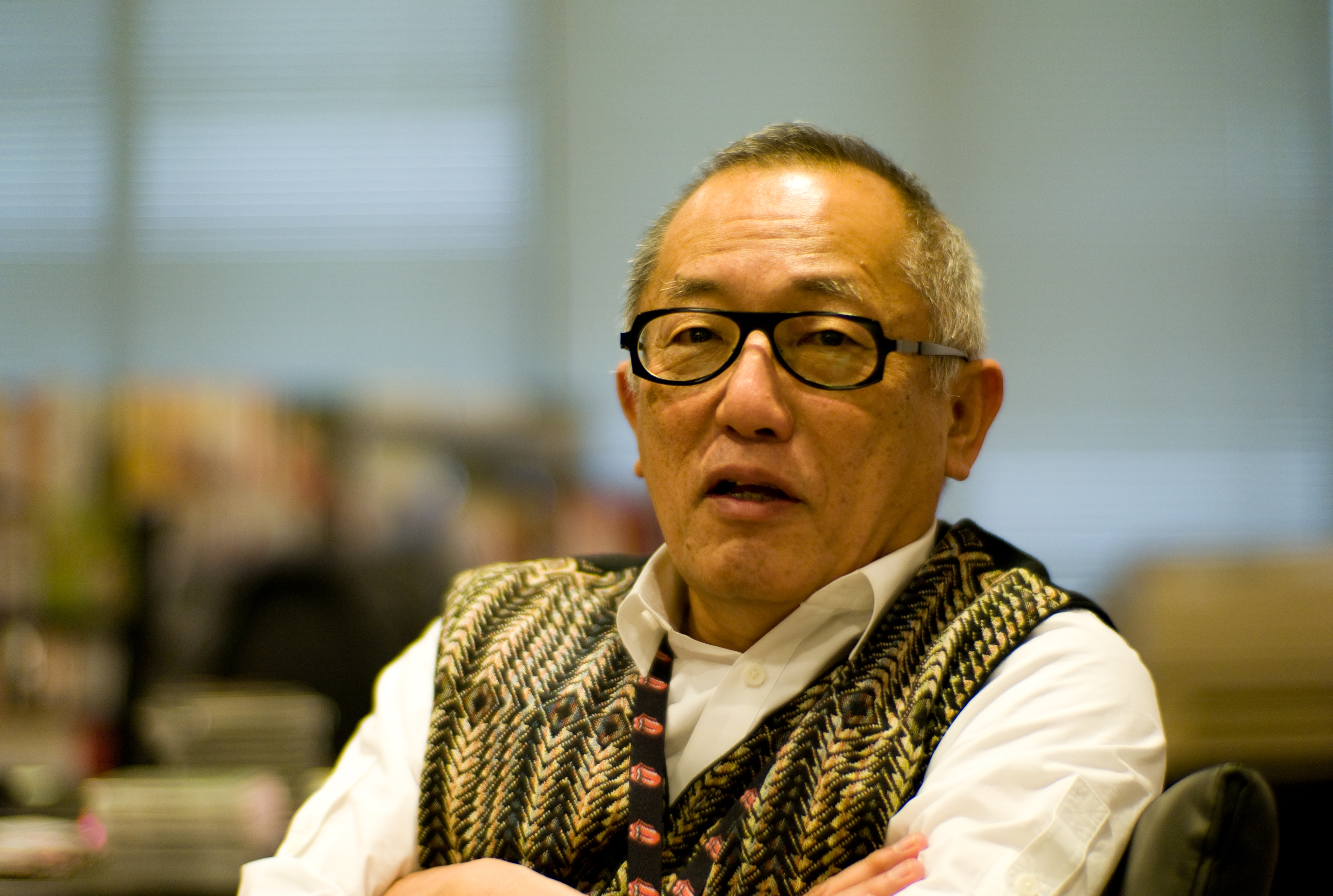 Sadahiko Hirose(廣瀬禎彦)